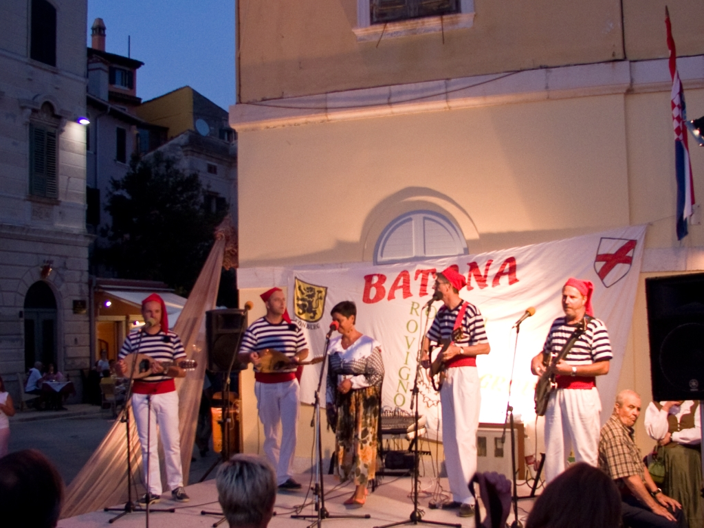 Batana (sastav) u Rovinju